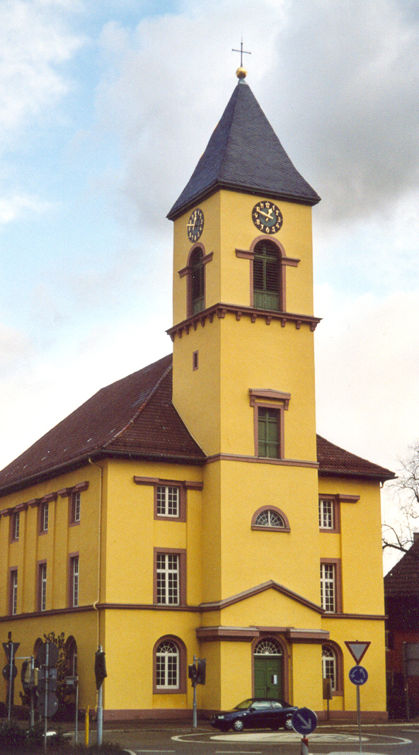 Die Langensteinbacher Ludwigskirche im Weinbrenner-Stil, erbaut 1826-28 nach Entwurf von Friedrich Weinbrenner.